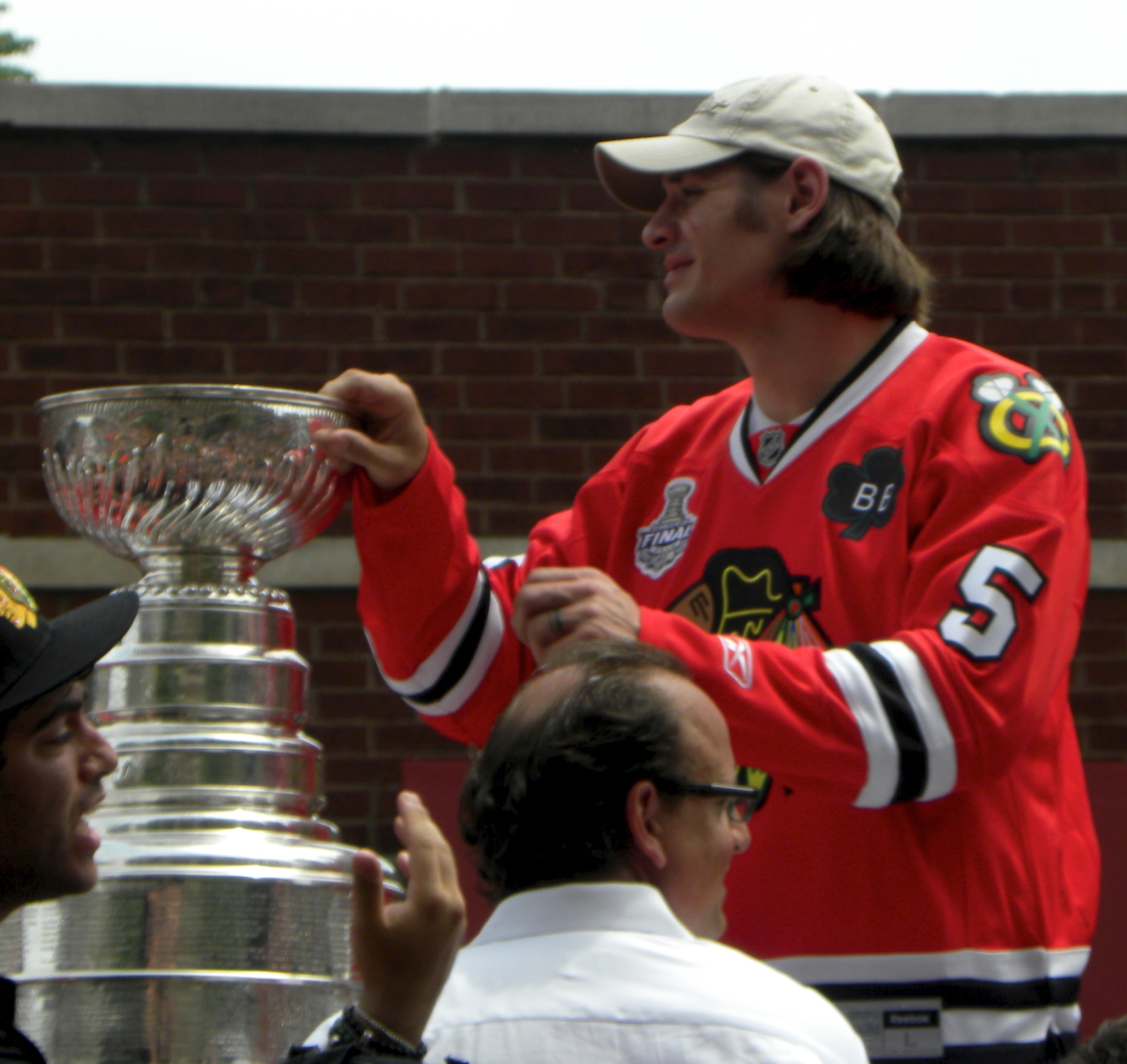 Stanley Cup